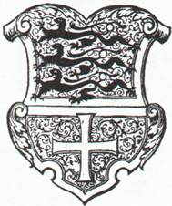 Dieses Wappen des Schwäbischen Kreises zeigt oben die drei Löwen des Herzogtums Schwaben, unten das Kreuz des Hochstifts Konstanz.